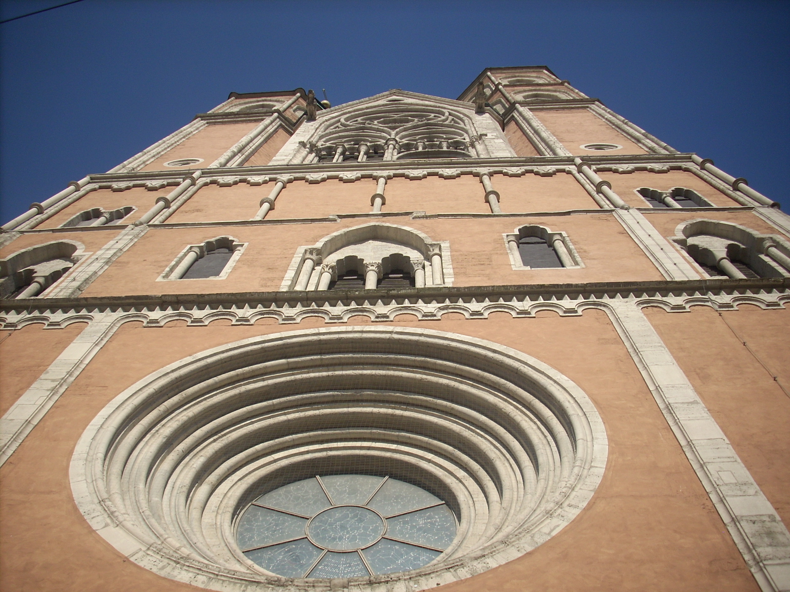 Braunschweig, St. Katharinen, Turmfront in Steilperspektive